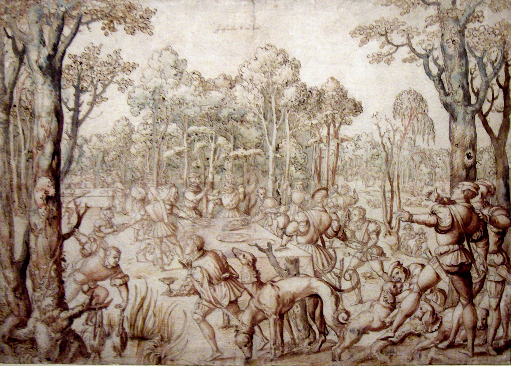 Voorbereidende studie voor een karton in de reeks wandtapijten "De jachten van Maximiliaan"